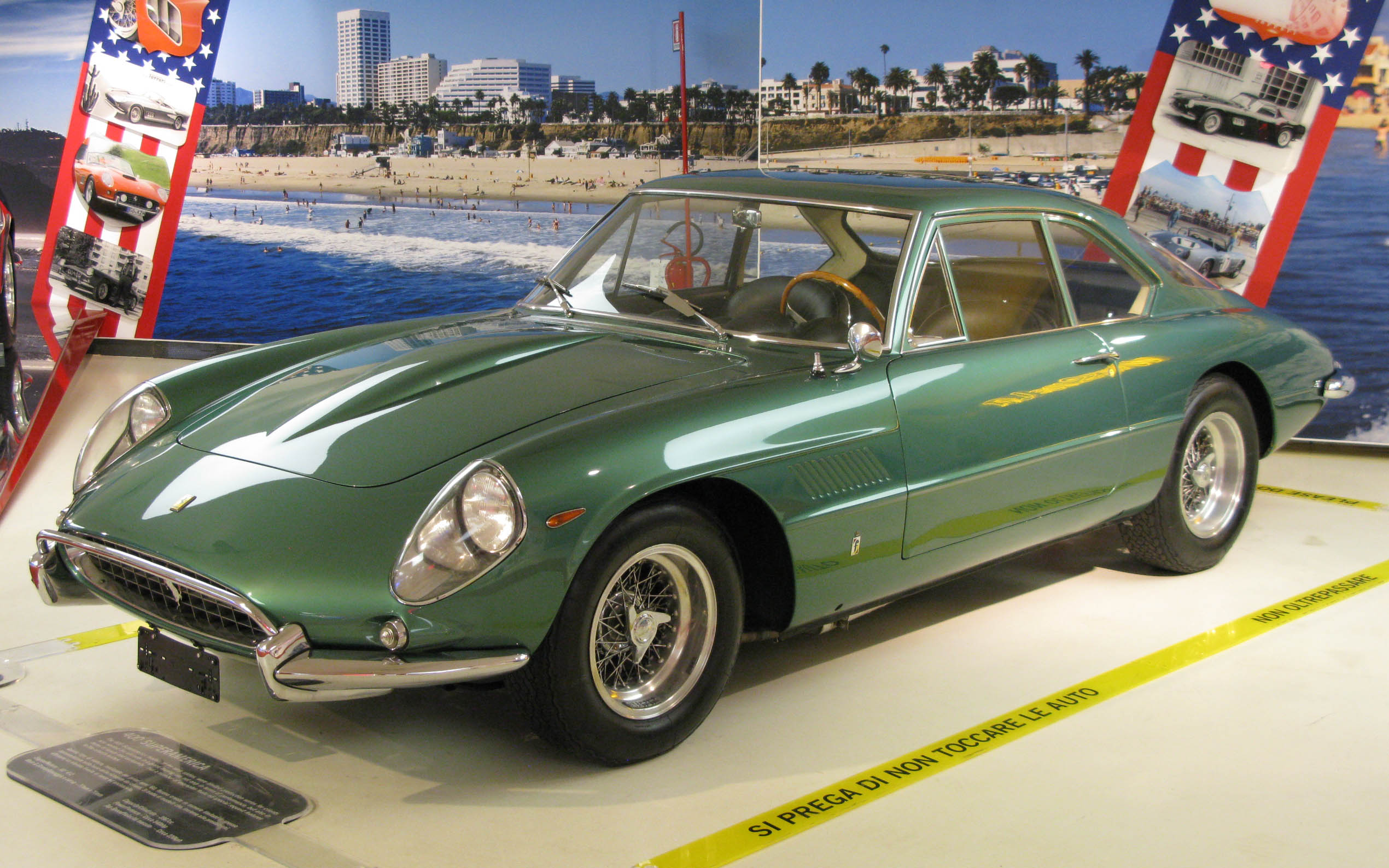 Ferrari 400 Superamerica. Serienummer 443SA.[1]